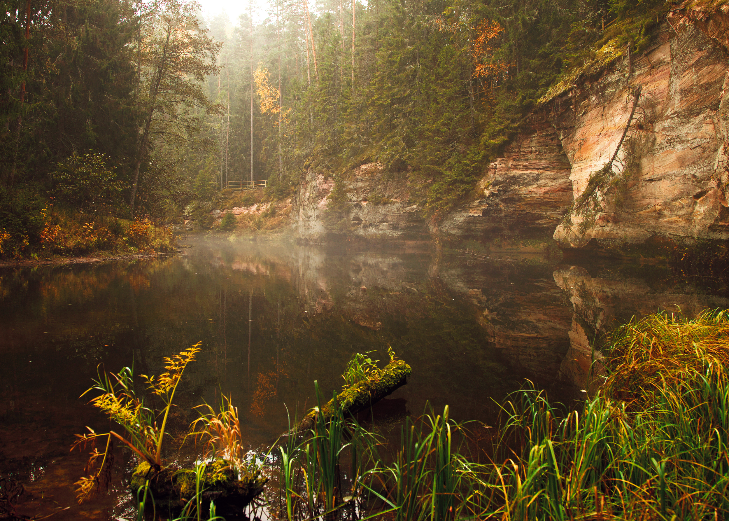 Ahja jõe ürgoru maastikukaitseala